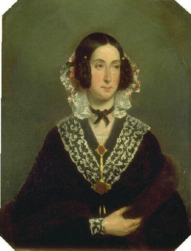 Portrait de Madame Bonie mère, Duvergié ?